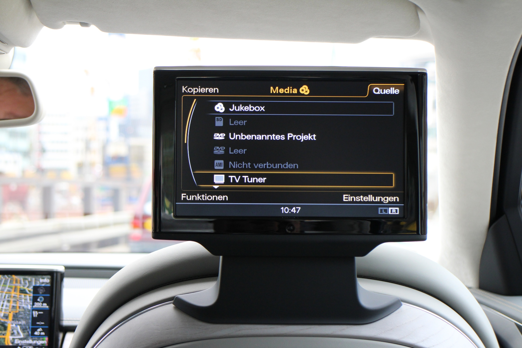 Facelift